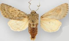 Psammopolia sala male